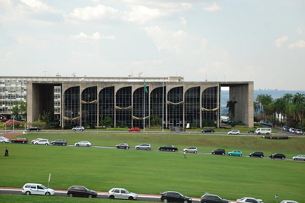 Brasilia Ministère de la Justice